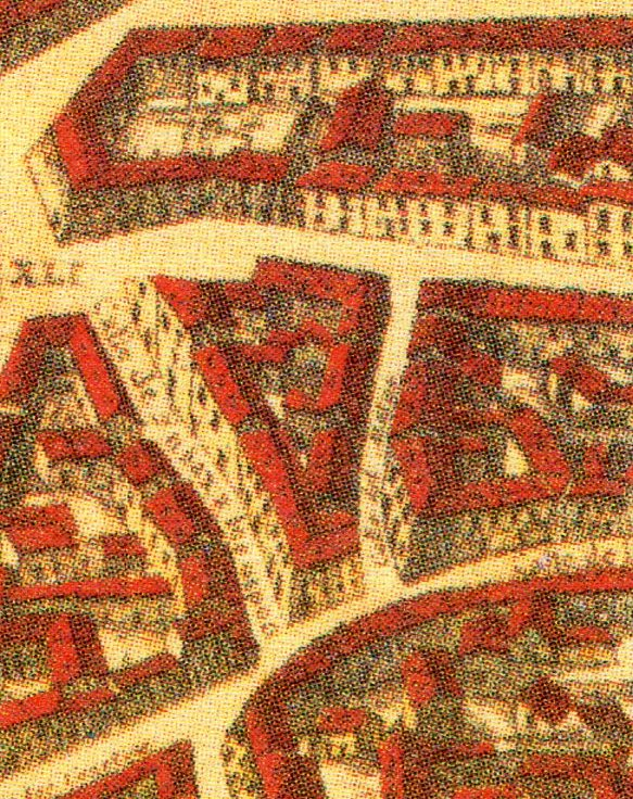 Topografía de la Villa de Madrid descrita por Don Pedro Texeira en 1656, en la cual se demuestran todas las calles al largo y ancho de cada una de ellas, las rinconadas y lo que tuercen las Plazas, fuentes, jardines y huertas con la disposición que tienen las parroquias, Monasterios y Hospitales están señalados sus nombres con letras y números que se hallaran en la tabla y los demás edificios, torres y delanteras de las casas de la parte que mira al Mediodía están sacadas al natural que se podrán tocar las puertas y ventanas de cada una de ellas.